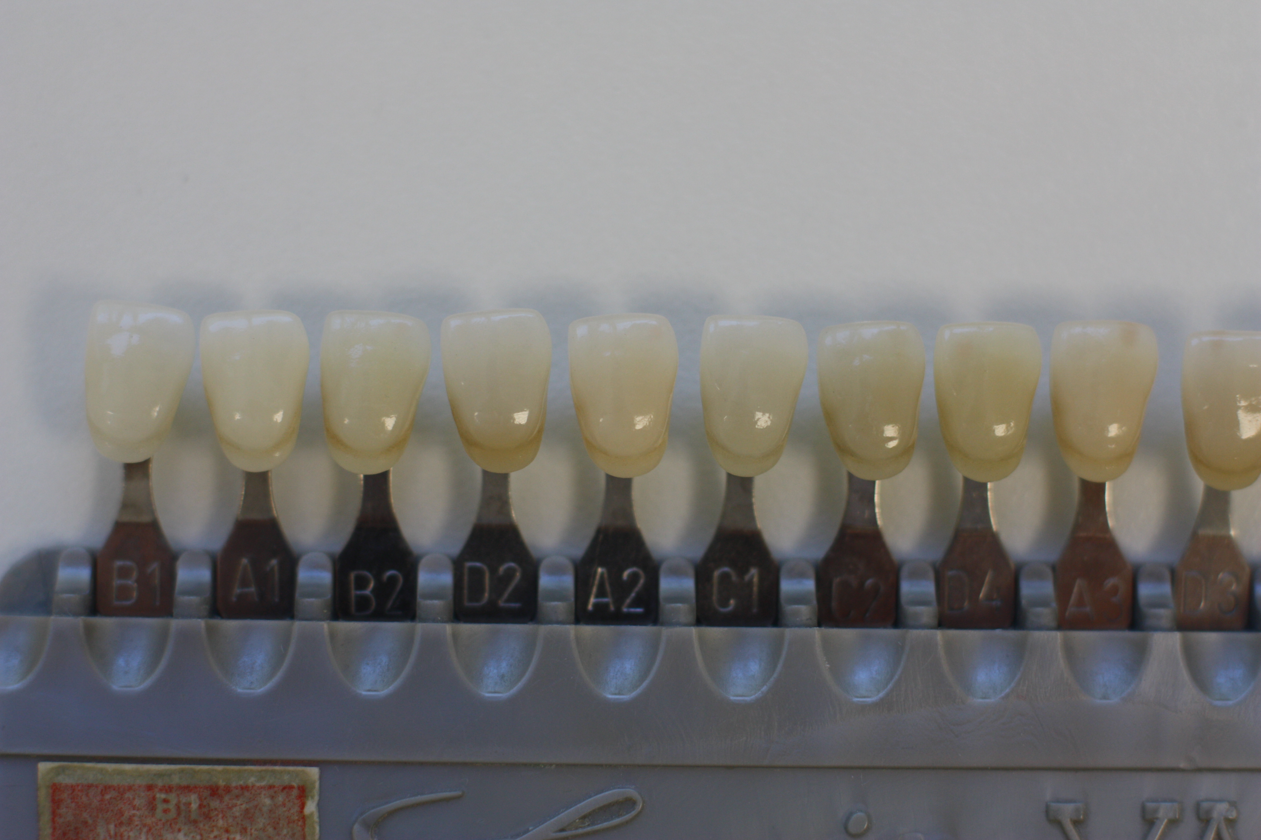 Zahnfarbe Frabring, Zahnfarbbestimmung, Bio-Farbring, VITA-Farbring, Farbring für Composits